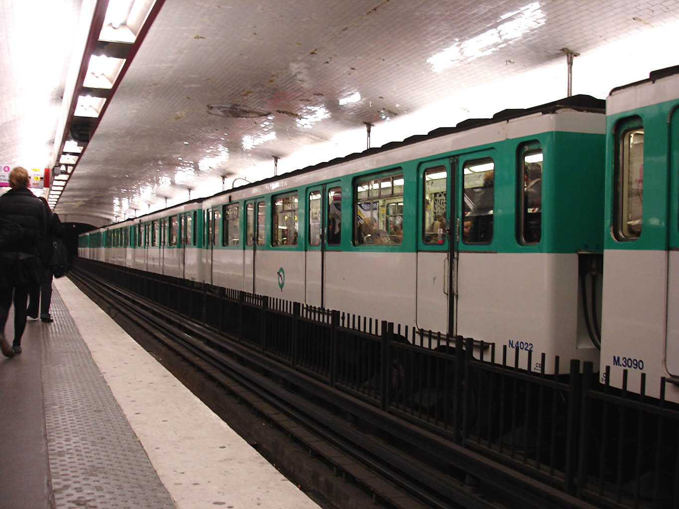 Métro de Paris (France) - ligne 4 - MP 59 à la station Châtelet